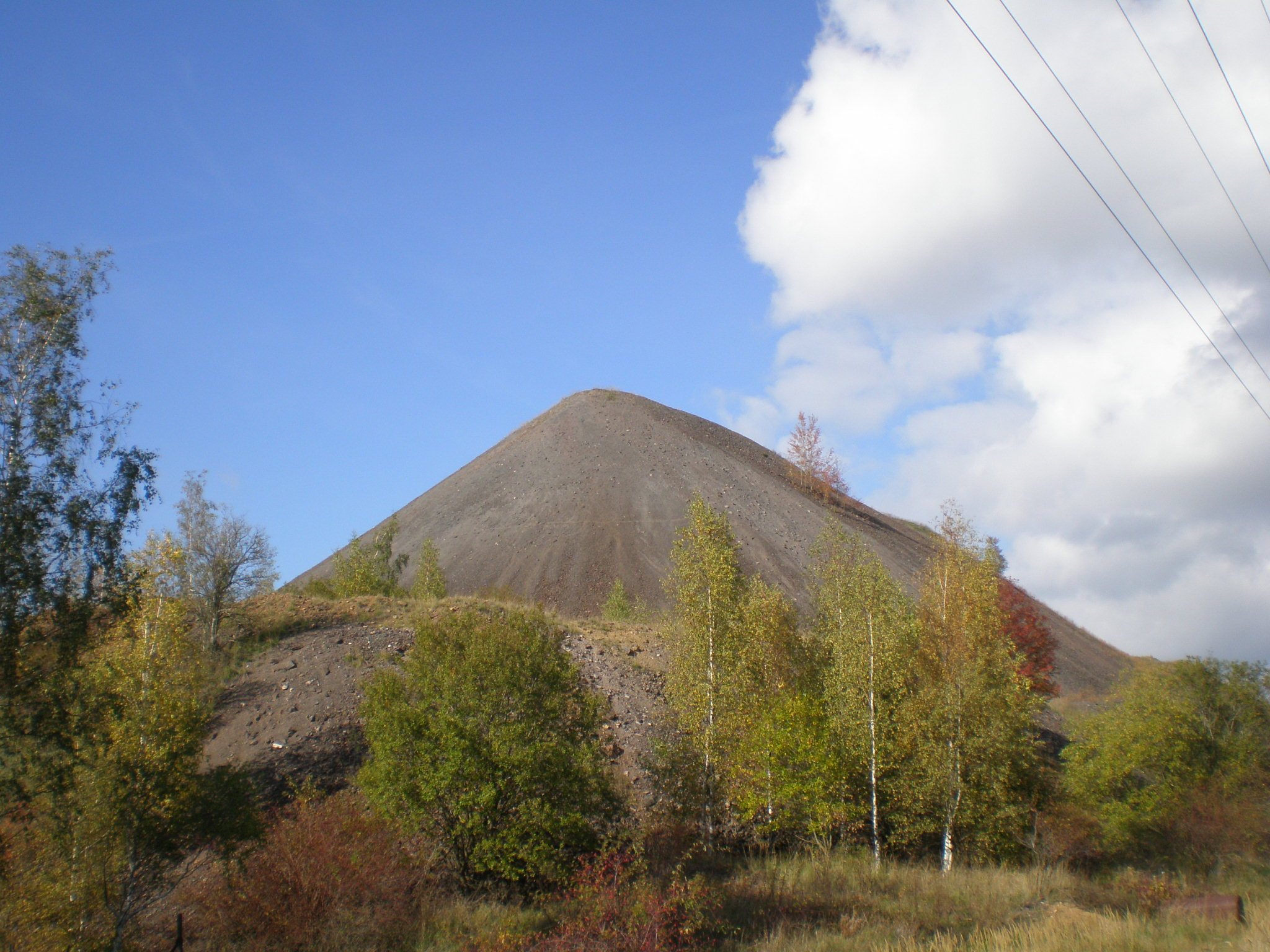 Zarůstající výsypky uranových dolů JV od Příbrami představují svérázné dominanty krajiny této části Příbramské pahorkatiny